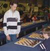 (Original text: Daniël Stellwagen)